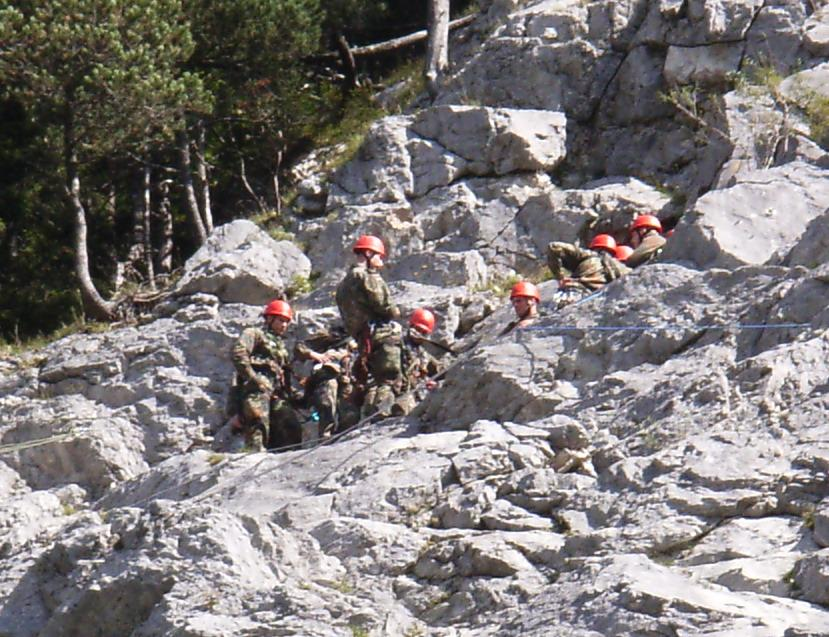 Gebirgsjäger in Mittenwald bei einer Kletterübung an dem lokalen Kletterfels.